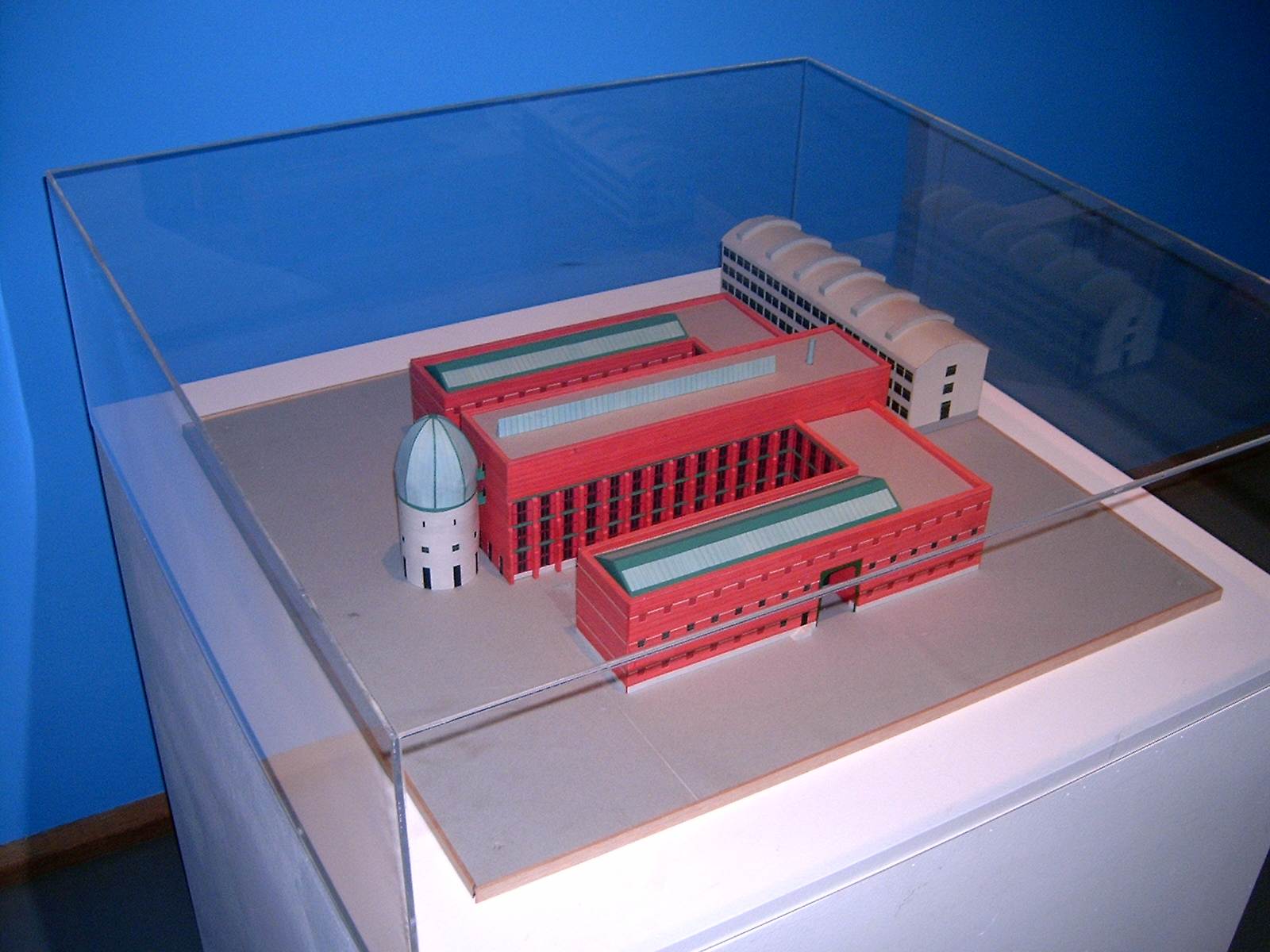 Bonnefantenmuseum